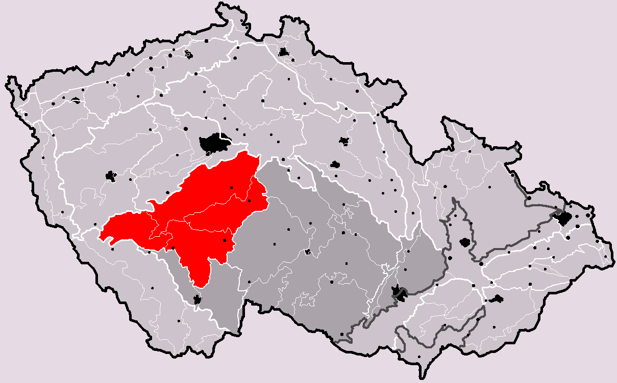 Poloha geomorfologické oblasti Středočeská pahorkatina v rámci České republiky. Hercynský systém Hercynská pohoří I Česká vysočina I2 (II) Česko-moravská subprovincie I2A (IIA) Středočeská pahorkatina